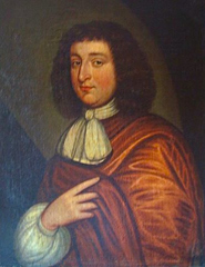 Robert Dixon Bt.